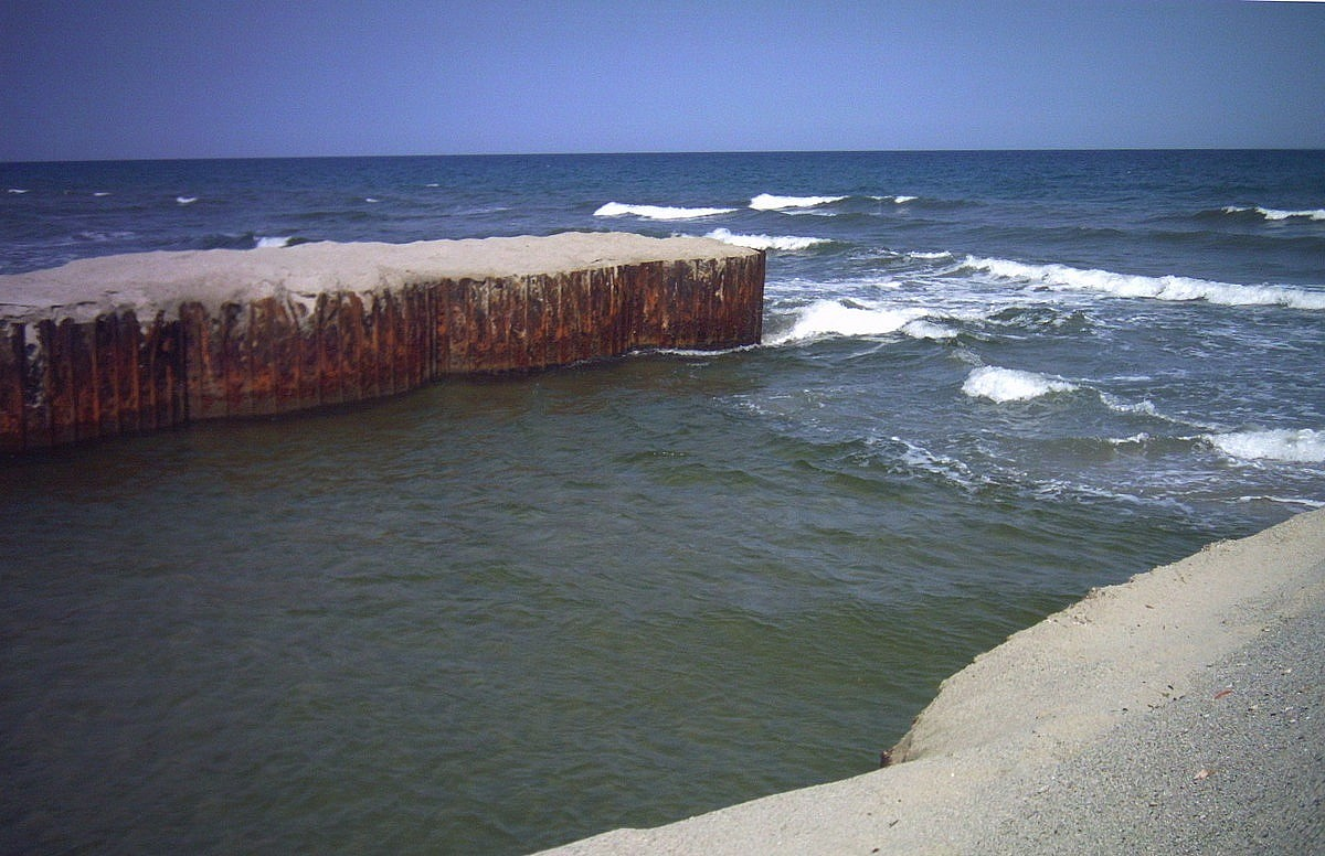 Le "grau" faisant communiquer l'étang d'Urbino avec la mer (sur la côte orientale corse).